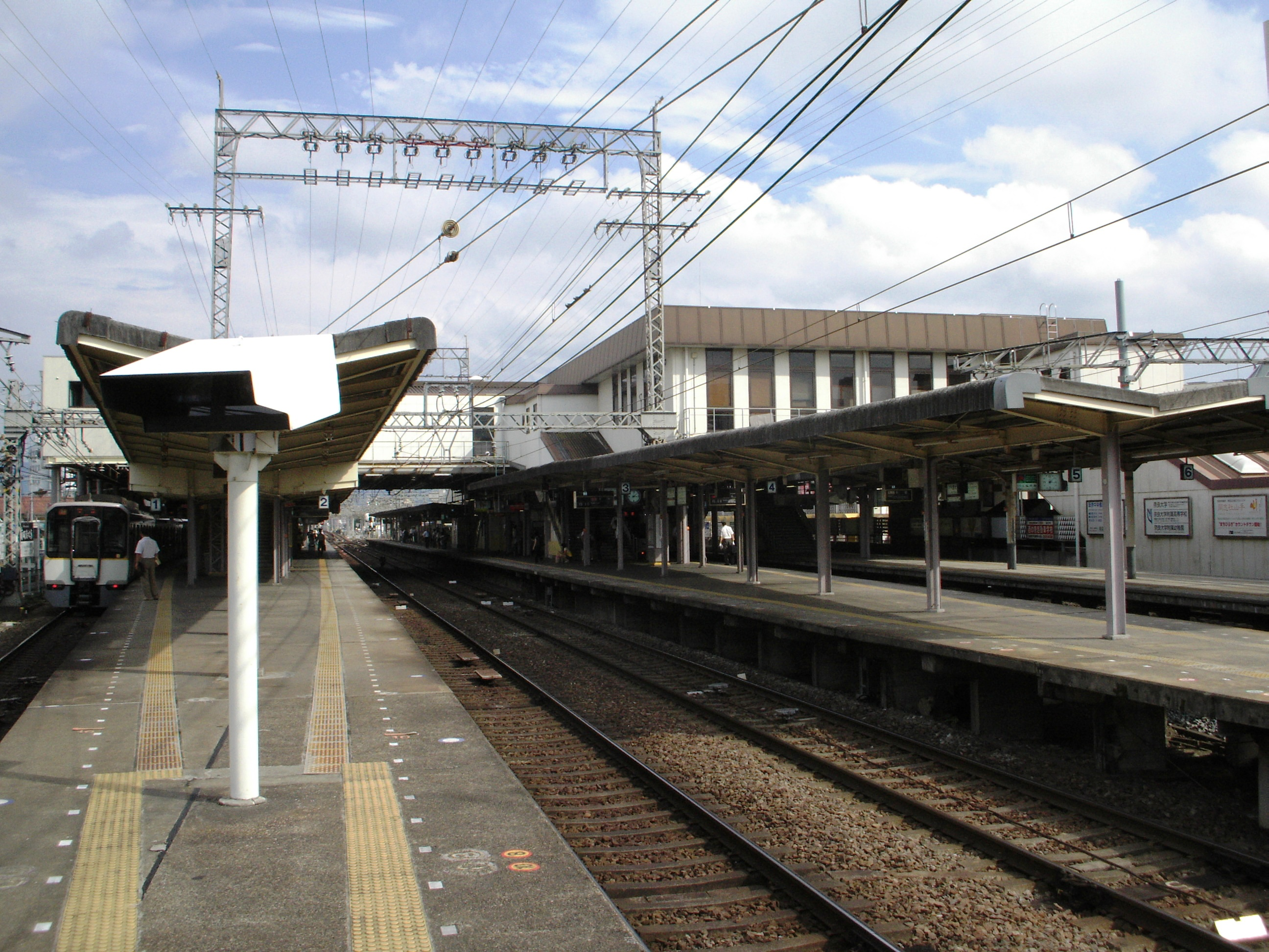 大和西大寺駅プラットホーム